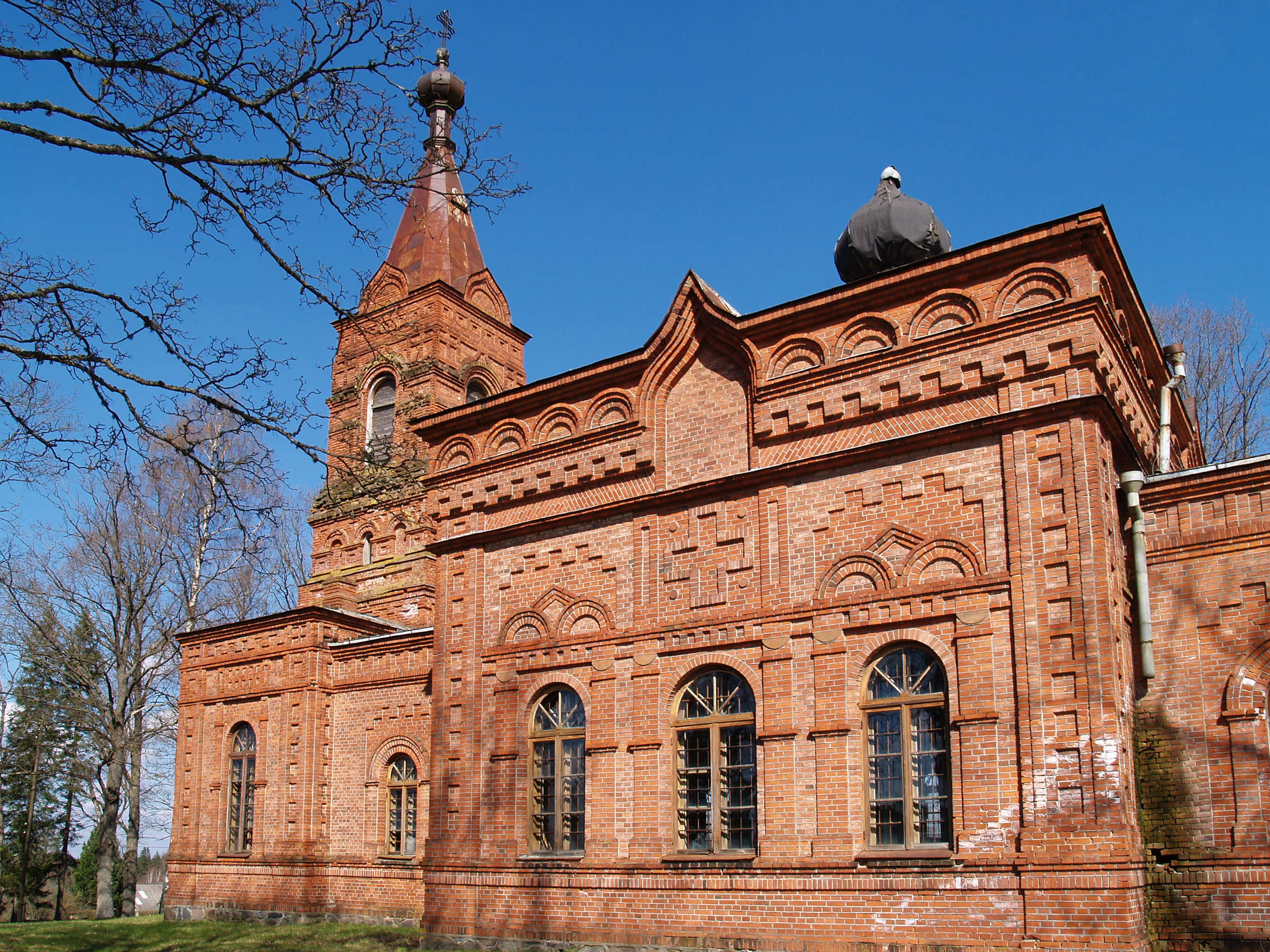 Suure-Jaani õigeusu kirik